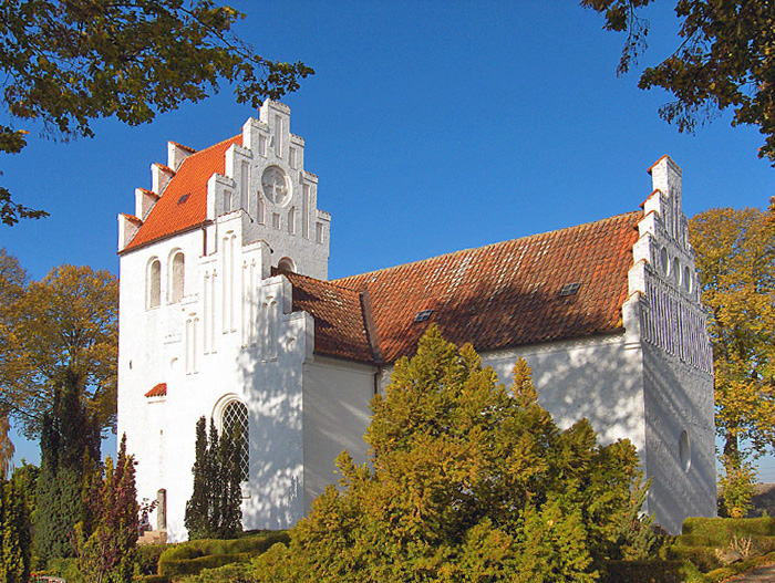 fra sydøst